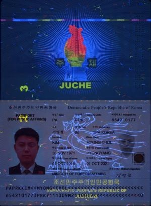 조선말: 흑광등 아래 조선화국려권 개인정보페이지